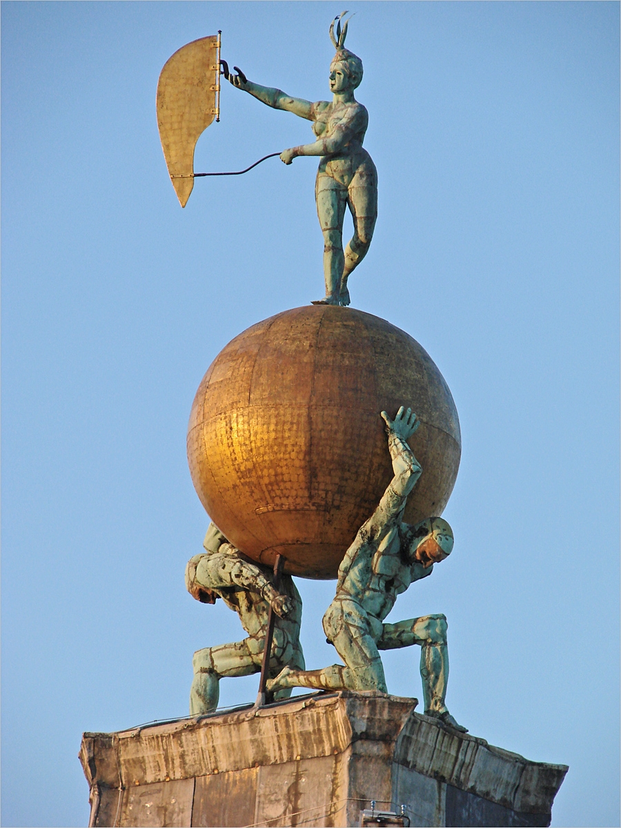 Cette girouette, à l'entrée du Grand Canal, surmonte le beffroi de la Pointe de la Douane (Punta della Dogana) aménagée en centre d'art contemporain par la Fondation F. Pinault. Elle est constituée de deux atlantes de bronze supportant la "Palla d'Oro" que domine la statue de la Fortune, de Bernardo Falcone. L'ensemble a été restauré par la Fondation F. Pinault dans le cadre du plan d'aménagement de la Punta della Dogana. Le site de la Fondation François Pinault